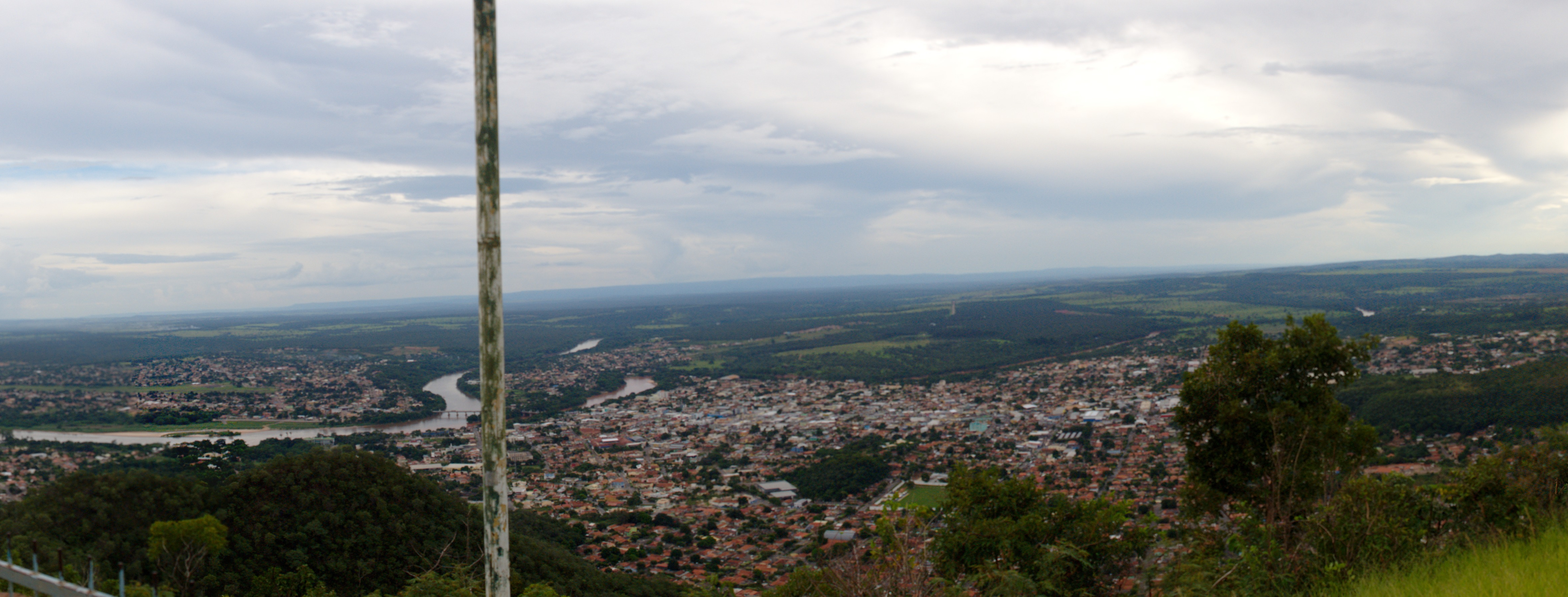 Elvido sur Barra do Garças el ĉe ĝia Krista statuo. Videblas la riveroj Araguaia kaj Garças, kaj la najbaraj urboj Aragarças kaj Pontal do Araguaia.